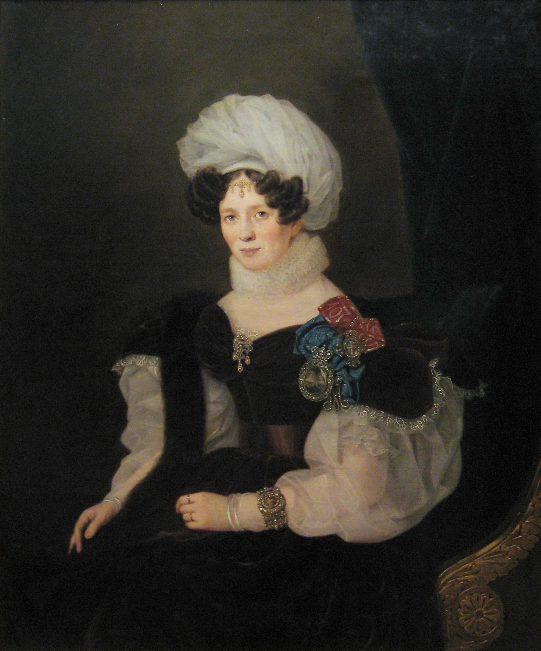 Княгиня Татьяна Васильевна Голицына, урожденной Васильчикова (1781- 1841), жена Д.В.Голицына.